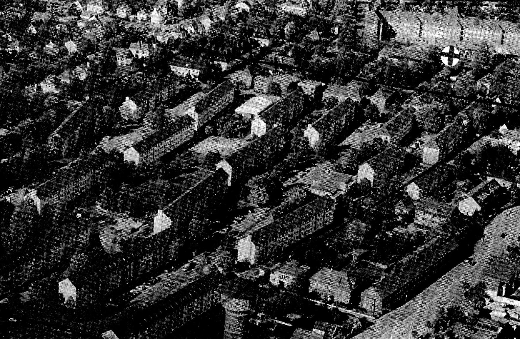 Luftaufnahme des Großen Blinks in Bremerhaven-Lehe-Nord